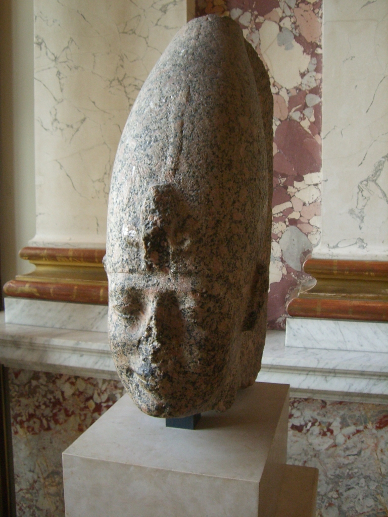 Tête d'une statue en granit du pharaon Nectanébo Ier - XXXe dynastie égyptienne - Musée du Louvre